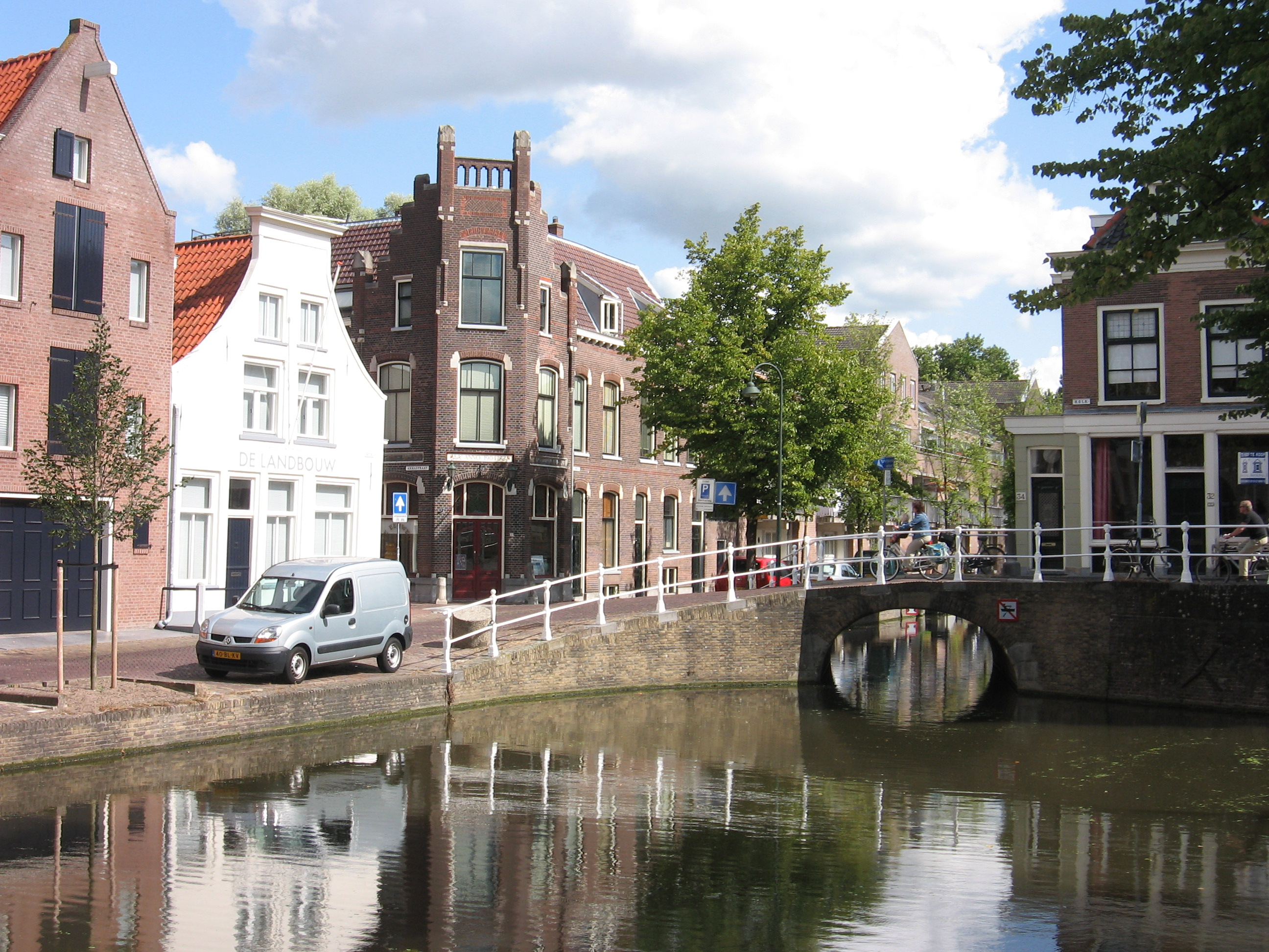 Delft - Brug Kolk-Annastraat.jpg (Name of bridge: Sint Annenbrug.)